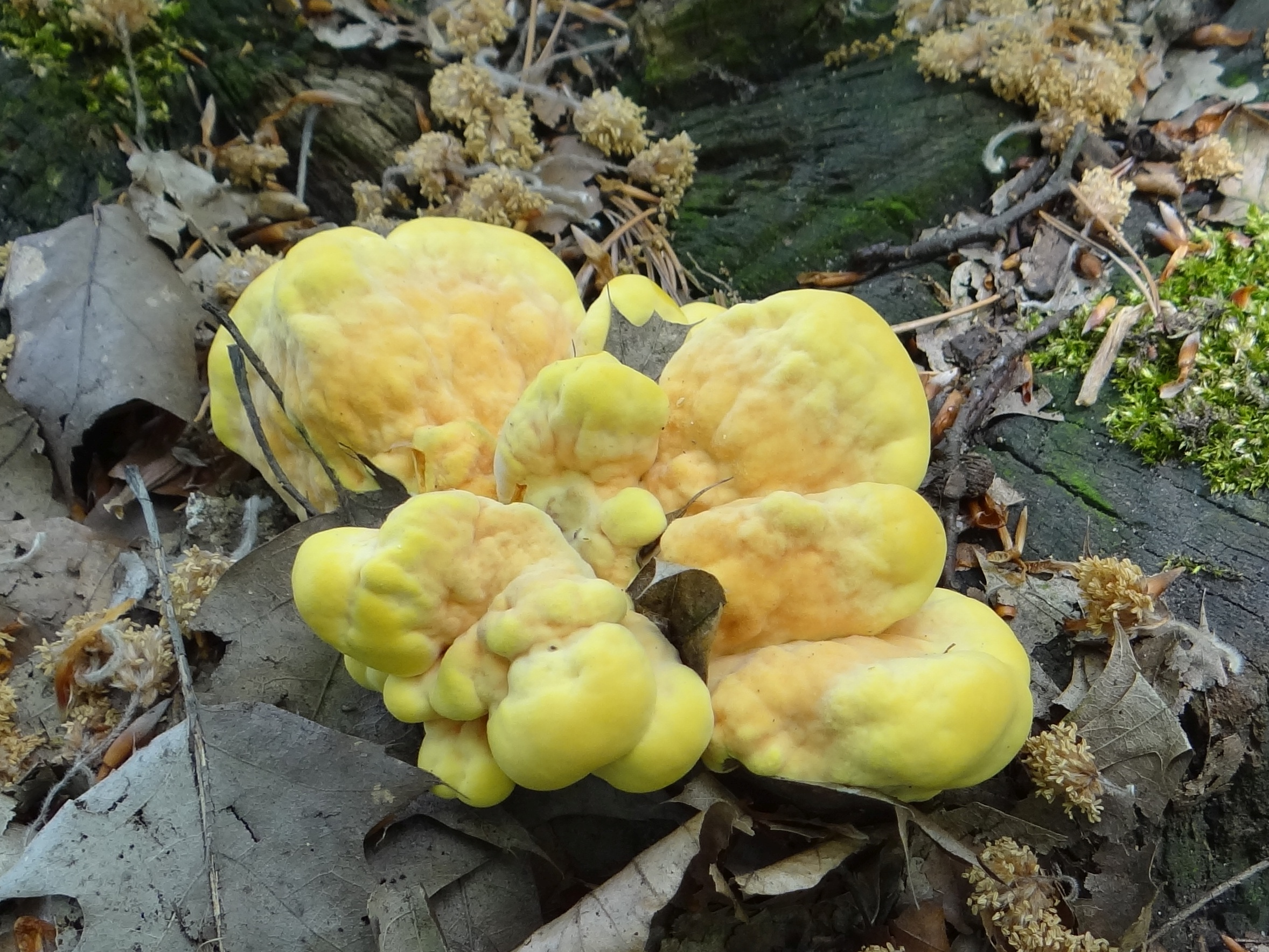 Laetiporus sulphureus (location : Poland)